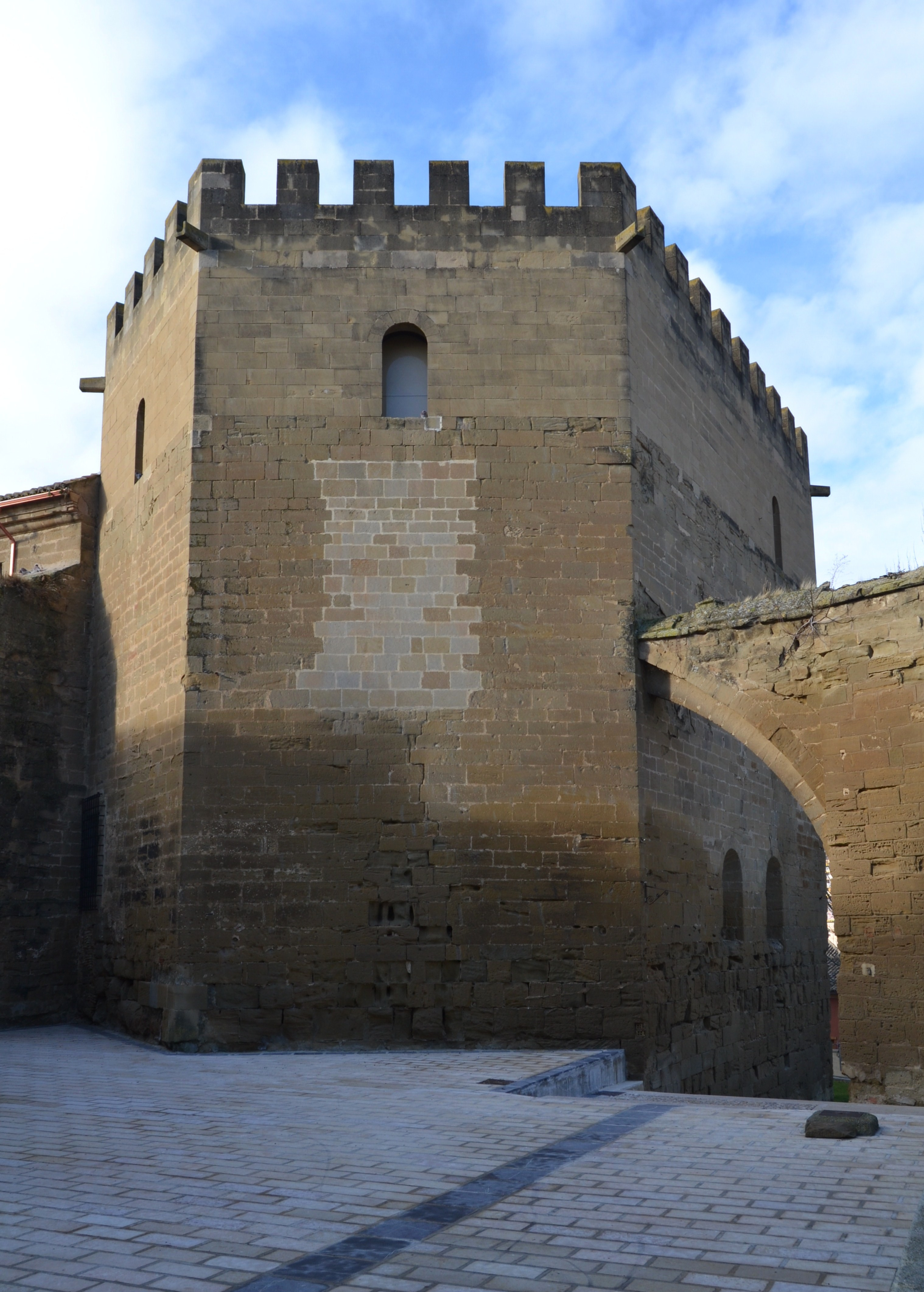 Palau dels reis d'Aragó, torre de la campana d'Osca.